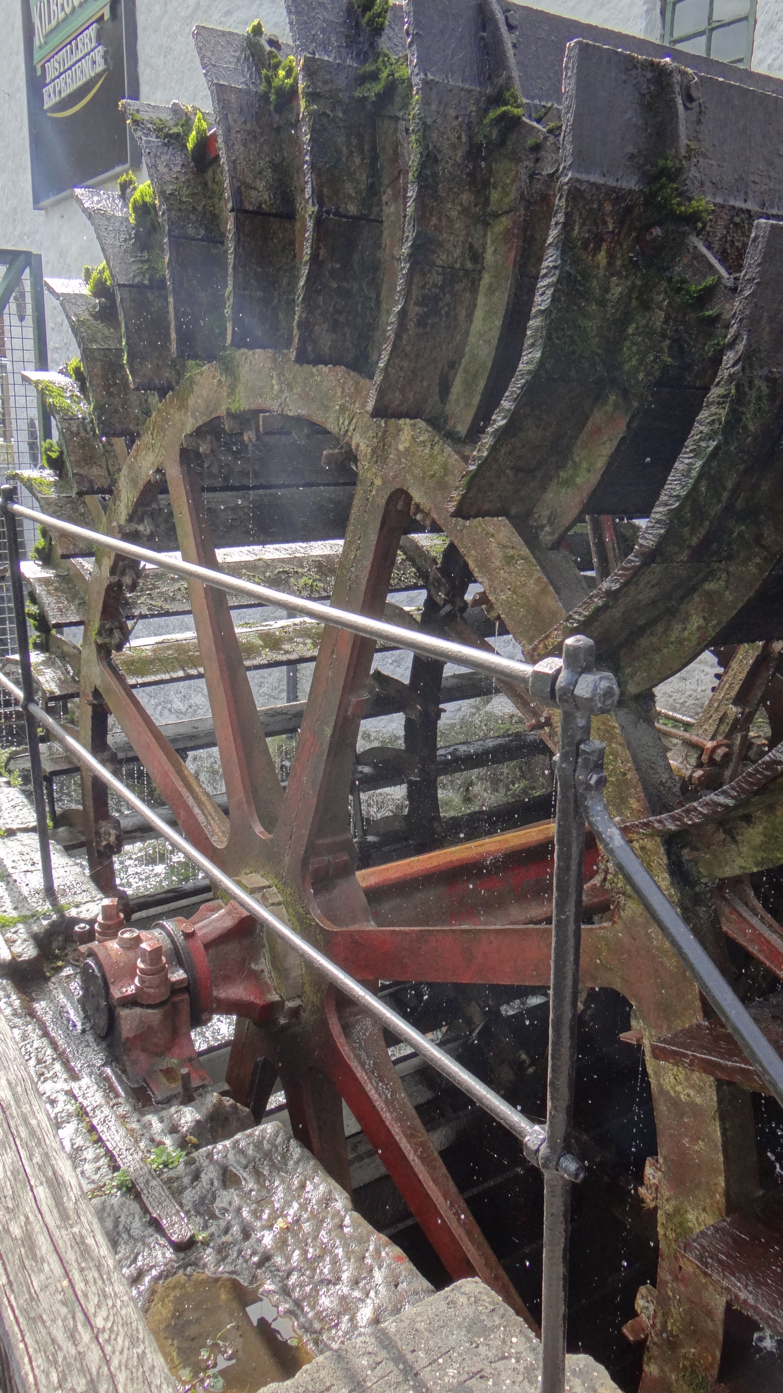 Distillerie de Kilbeggan